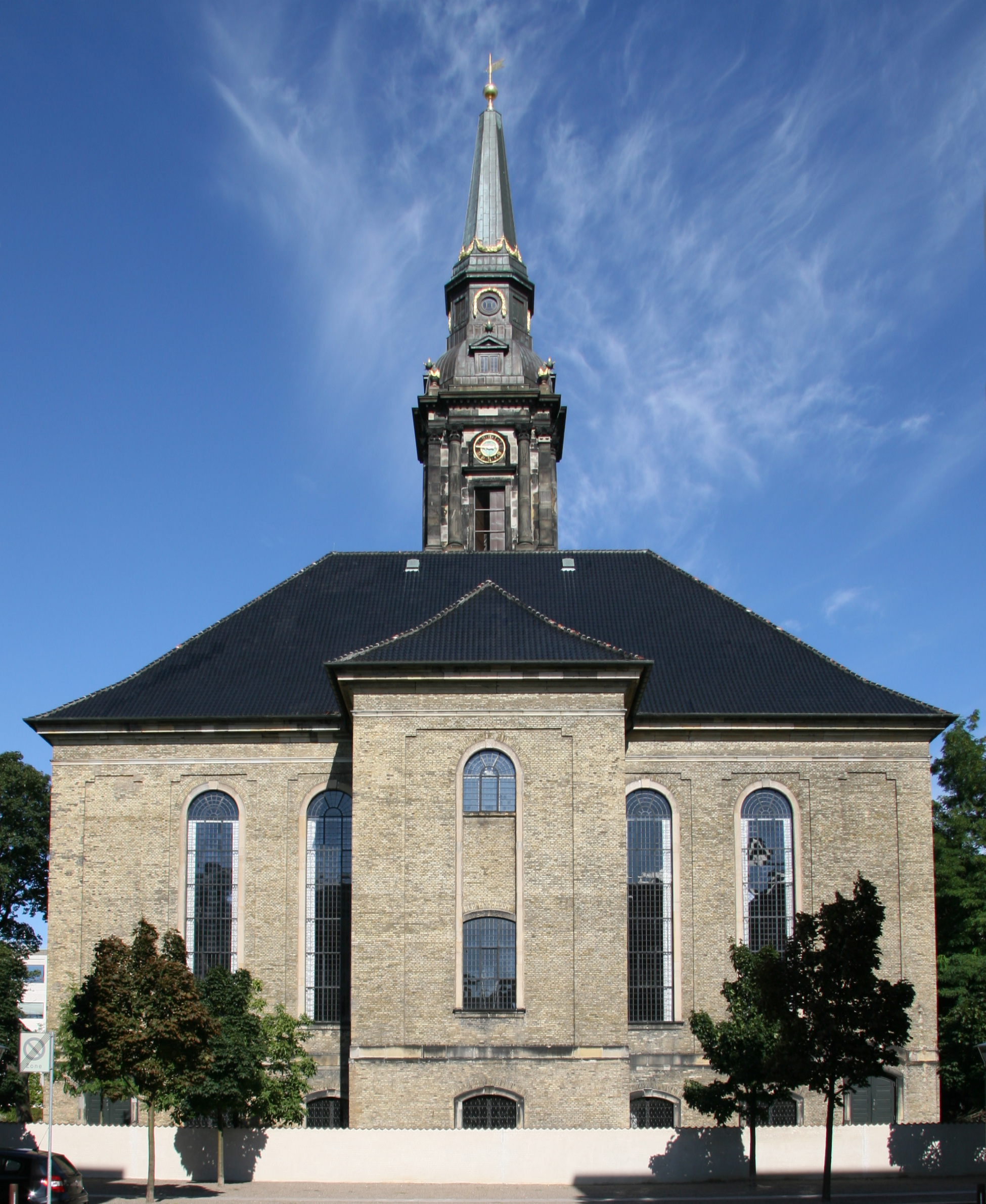 Christians Kirke, Copenhagen, Denmark.